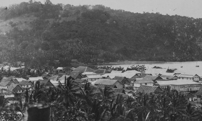 Foto. Het dorp Madjene ligt aan een baai